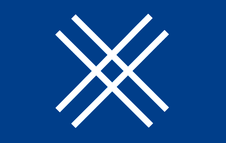 Rahvusliku noorteliikumise Sinine Äratus võitluslipp